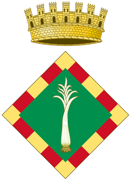 Escut oficial de l'Alt Camp